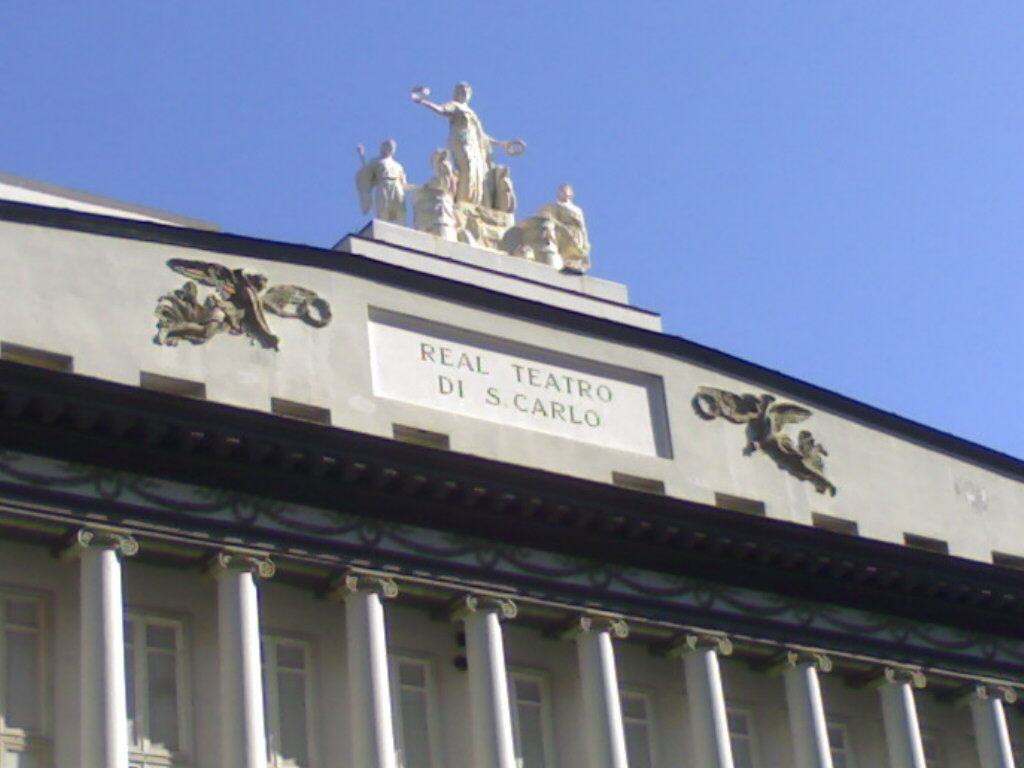 Intestazione del Real Teatro San Carlo di Napoli.